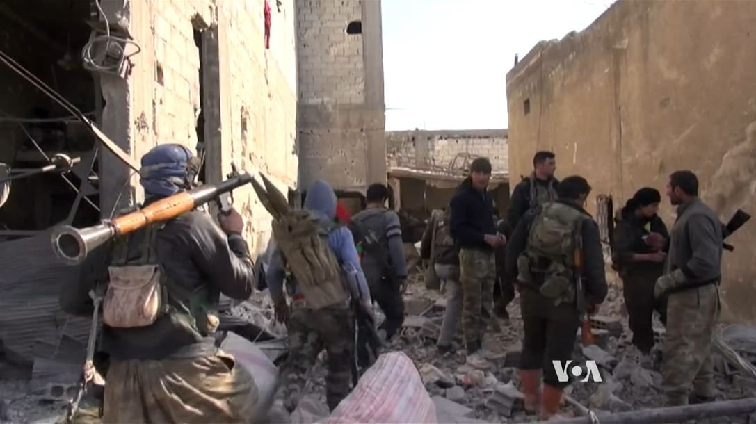 YPG pendant la bataille de Kobané, vers fin janvier ou début février 2015.